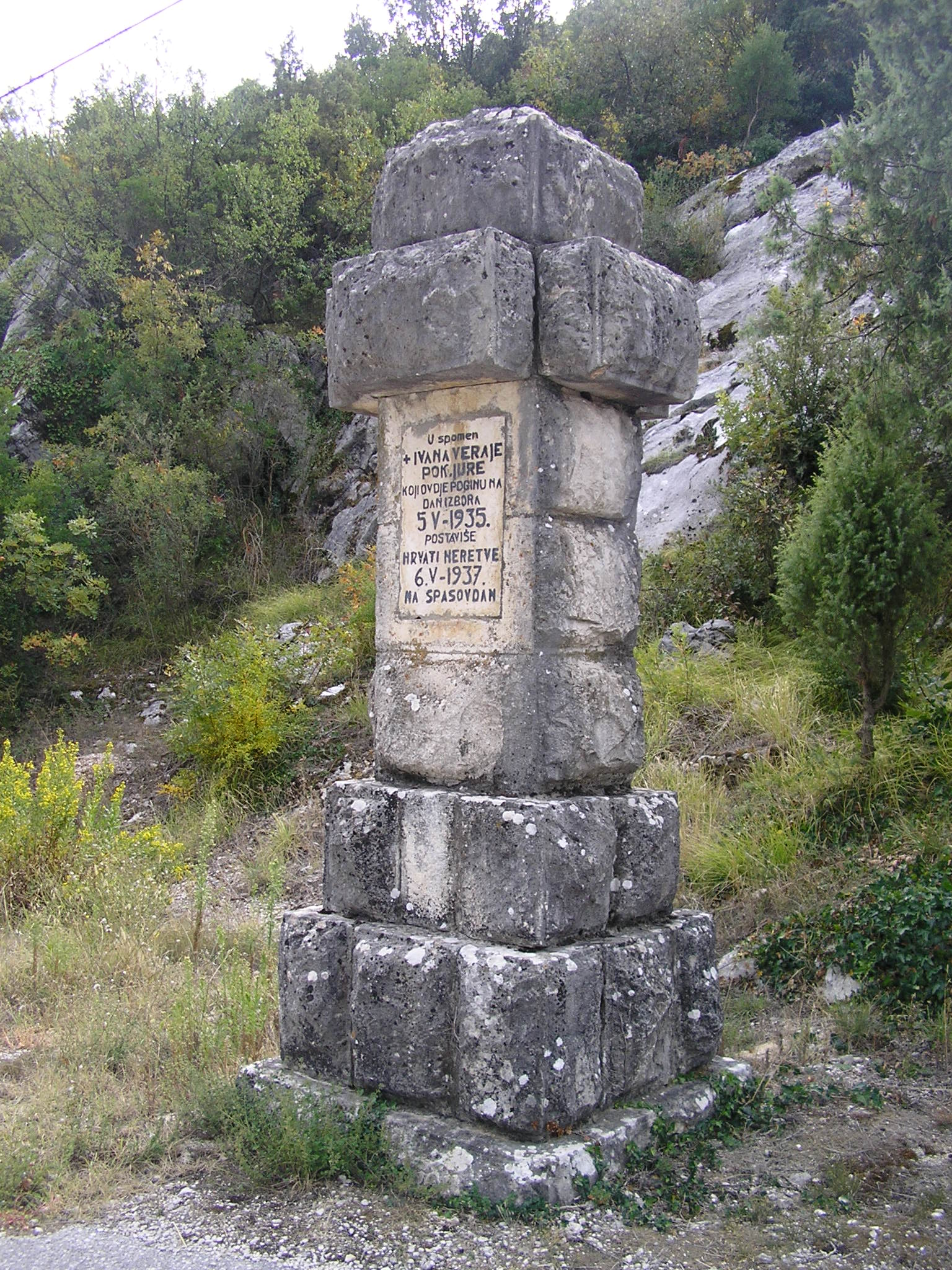 Spomenik Ivanu Veraji u Bijelom Viru